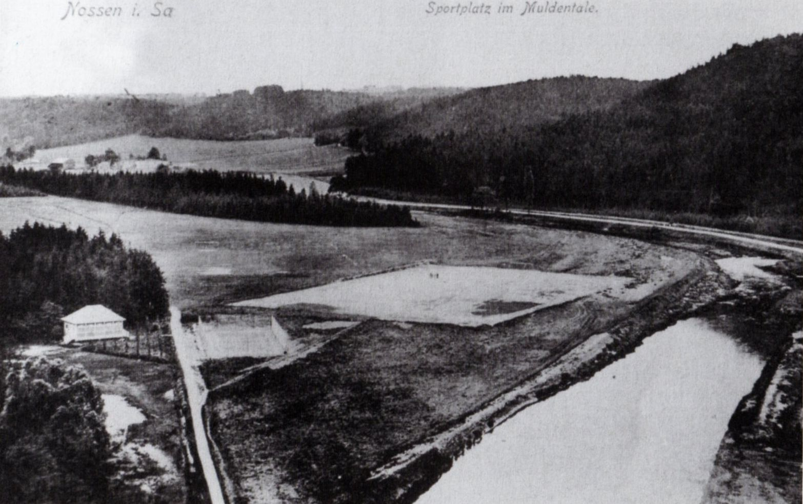 Links: das hölzerne Umkleidehaus Mitte: Tennisplatz Rechts: Hartplatz hinterer Bereich: zusätzliches Spielfeld